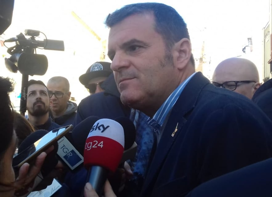 Gian Marco Centinaio a Cagliari